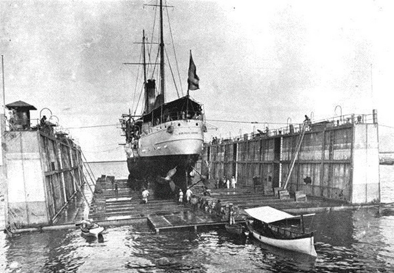 Crucero Mariscal Sucre de la Armada de Venezuela en el dique de Puerto Cabello.